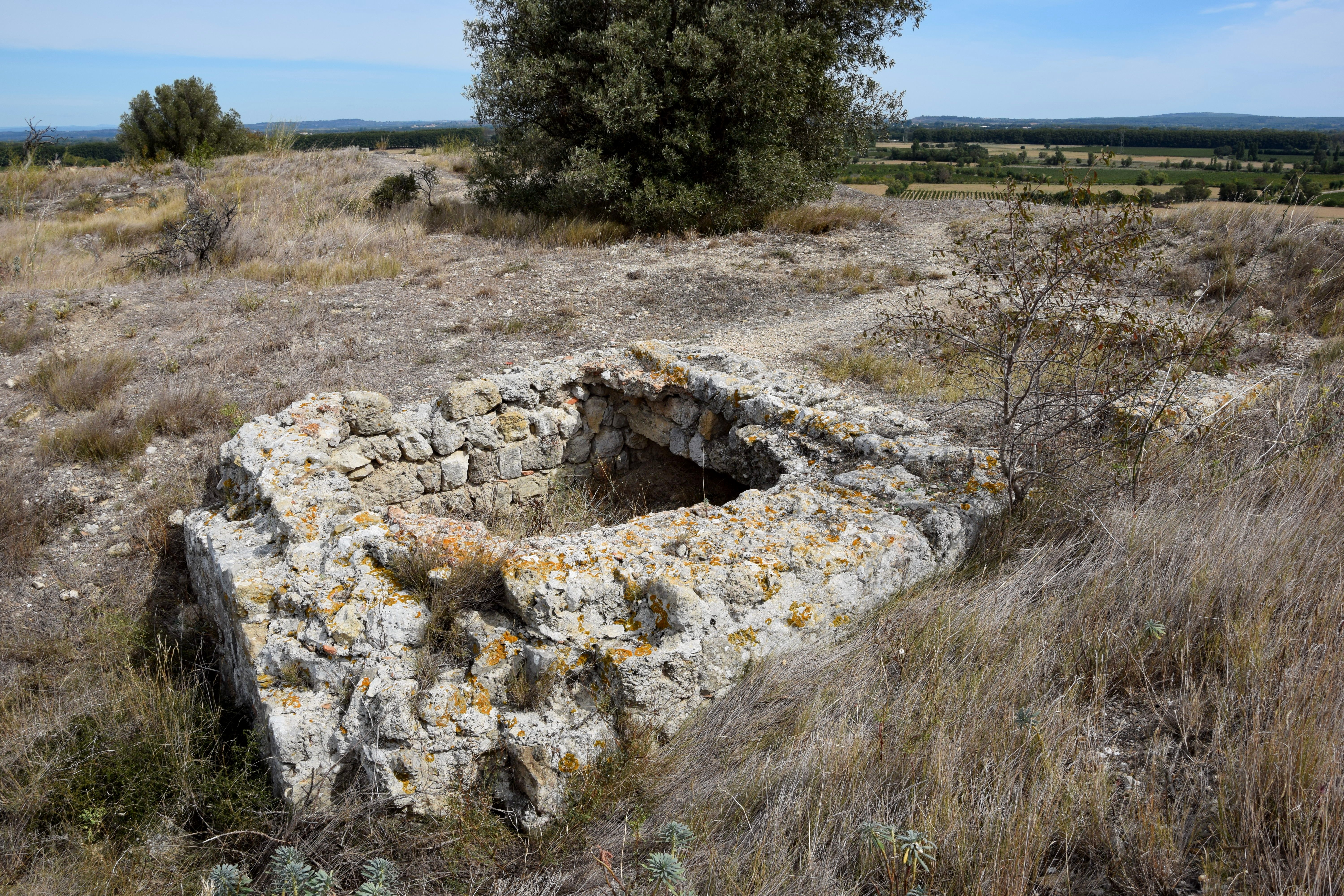 Oppidum de Montlaurès .